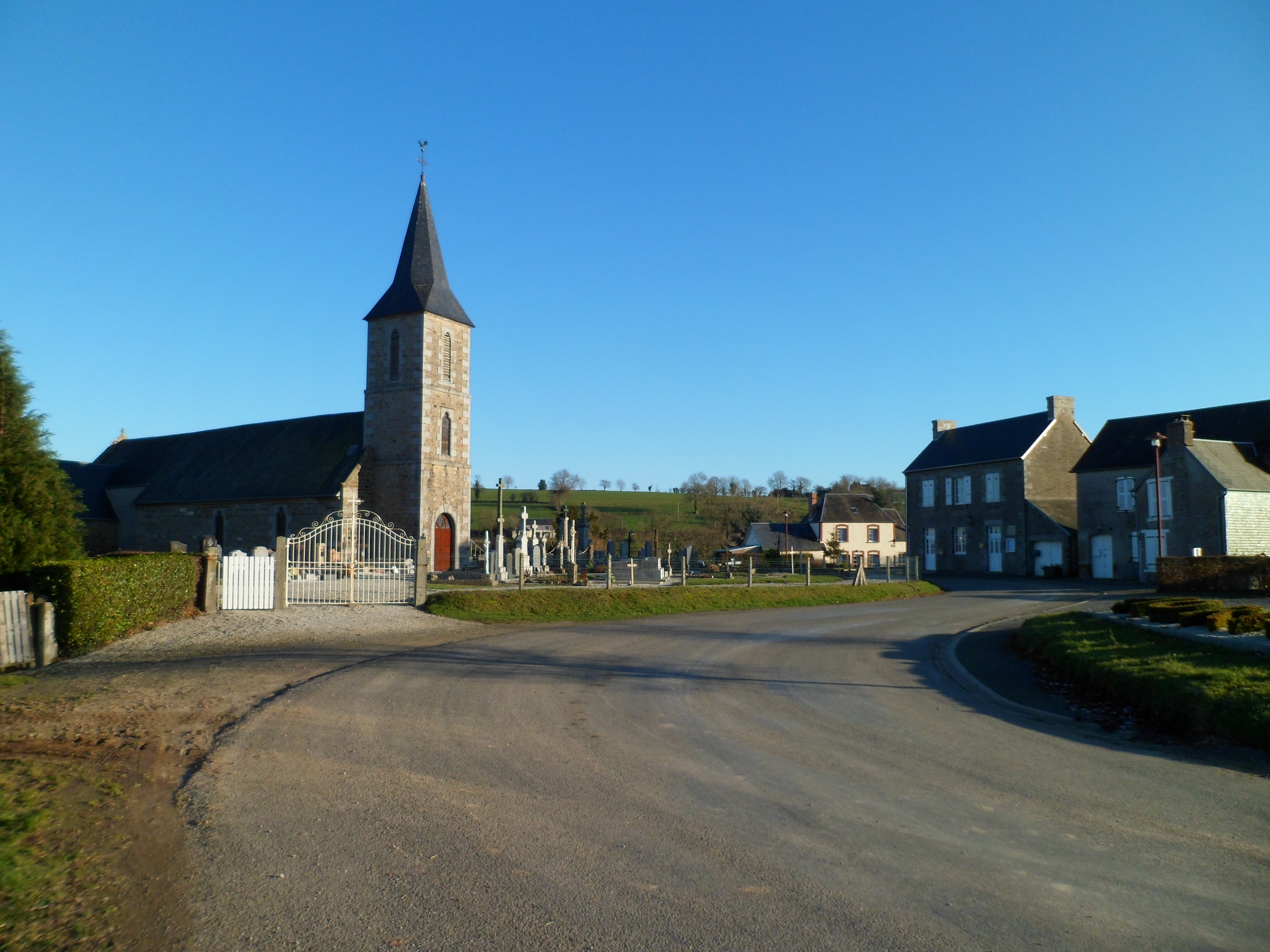 Morigny